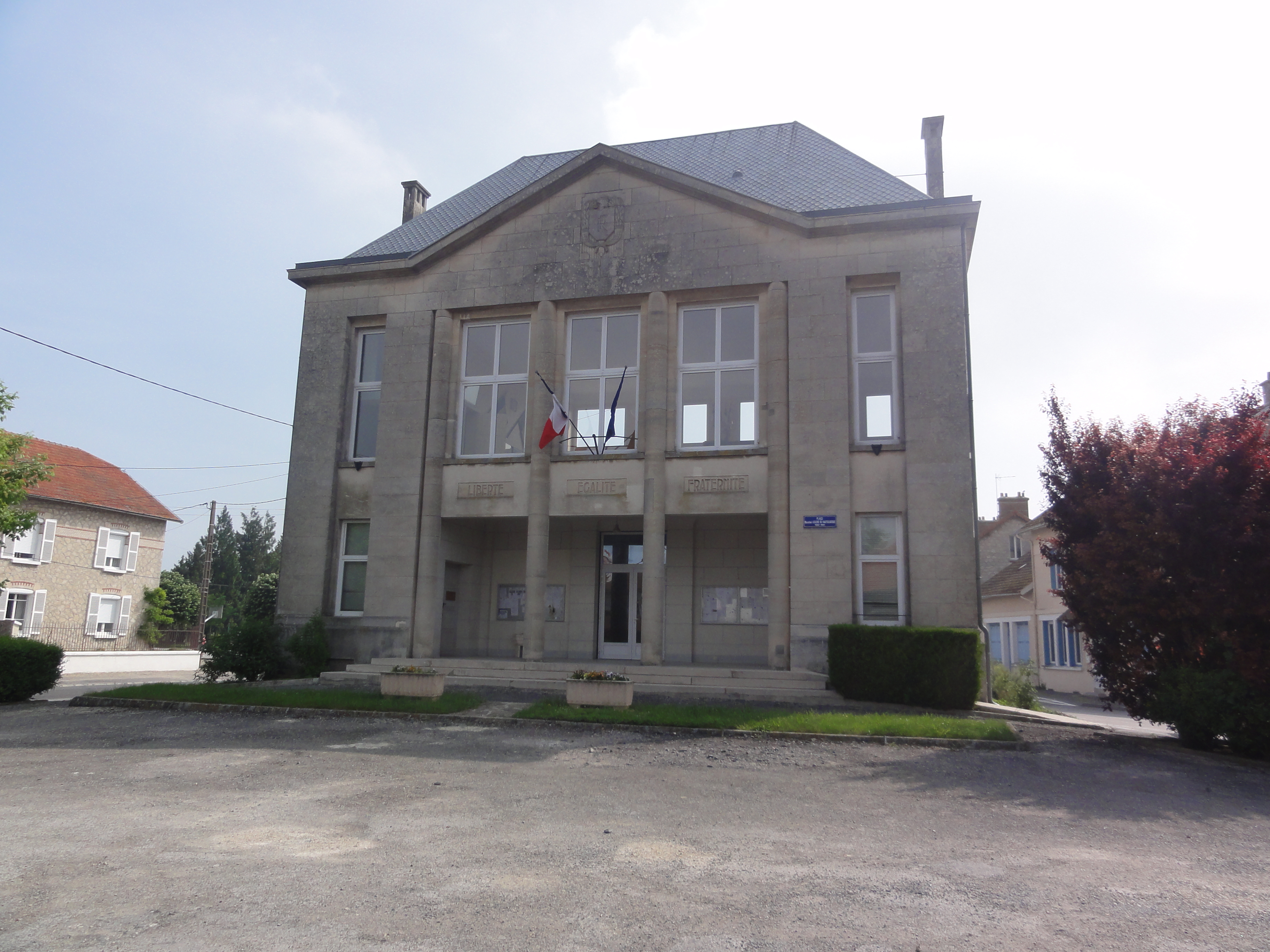 Berry-au-Bac (Aisne) Mairie .